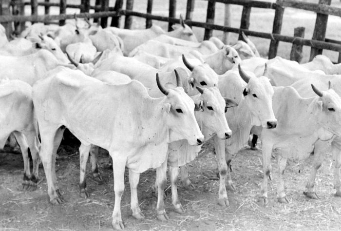 Repronegatief. Sapi's voor export in veekooi op Sumba